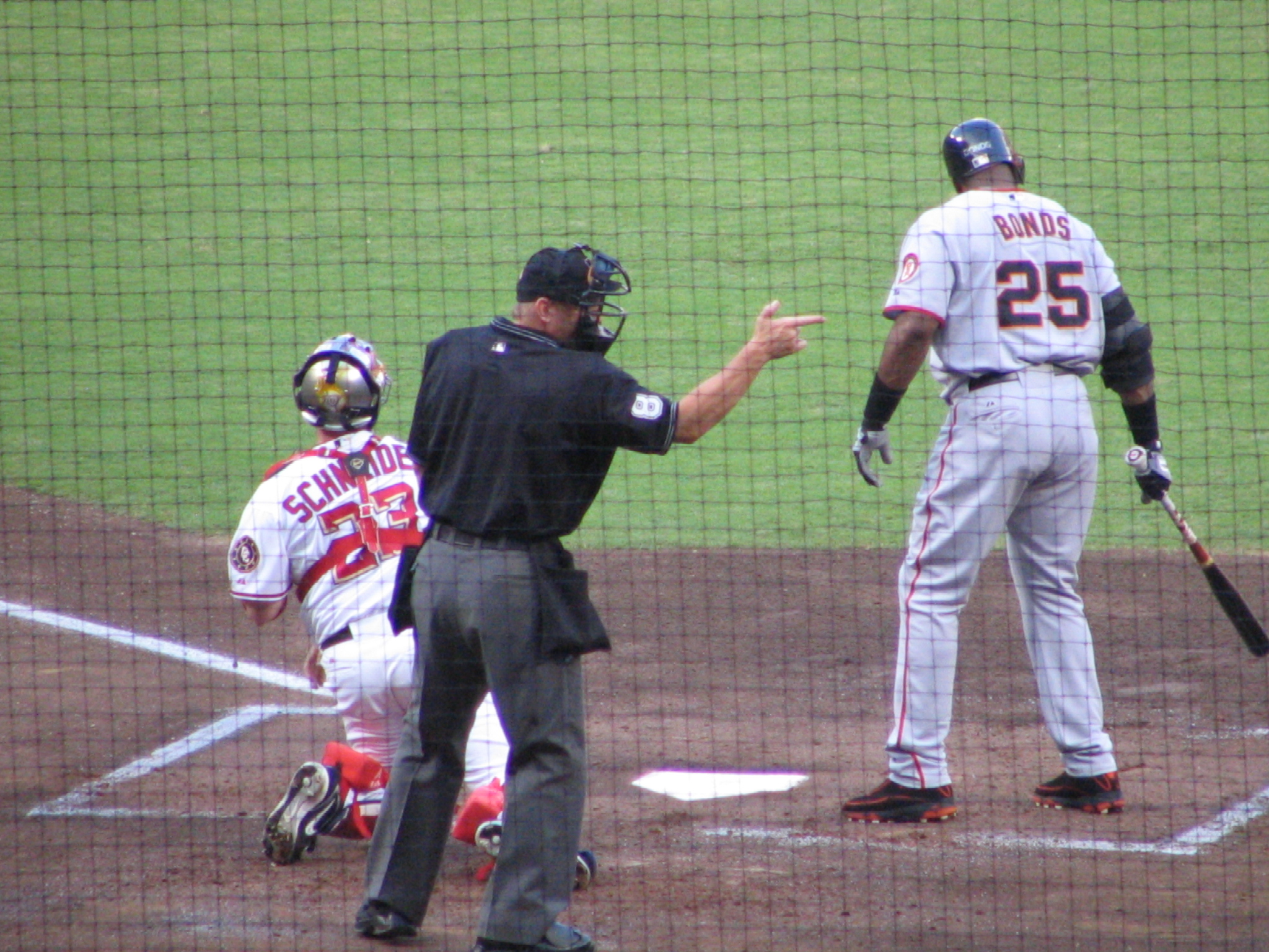 Barry Bonds after a strike.